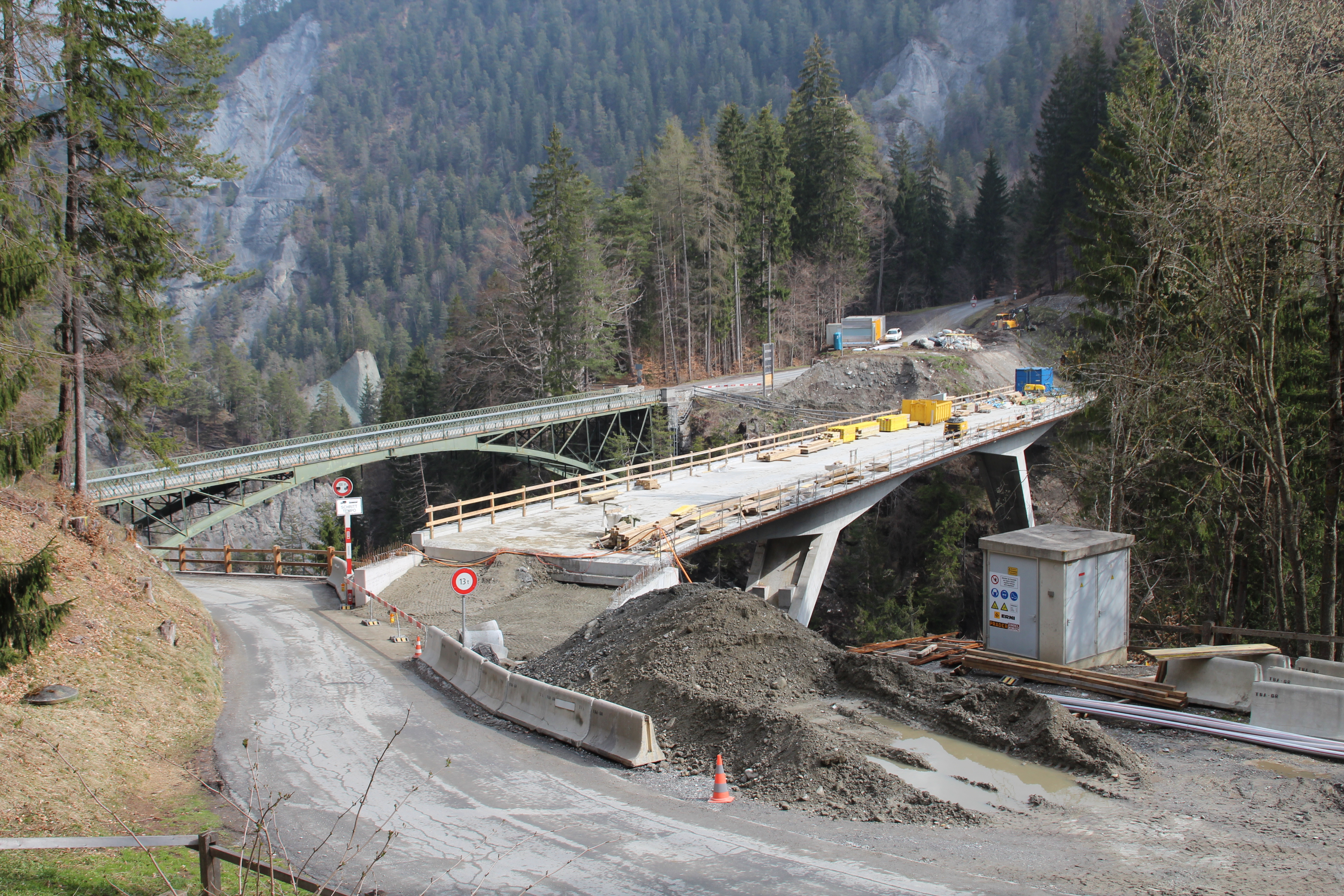 Versamer Tobelbrücke Bau der neuen Brücke, April 2012